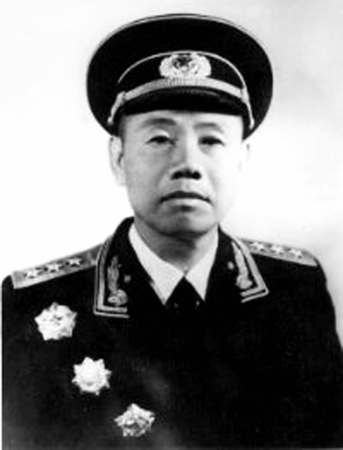 1955年王宏坤受勋图